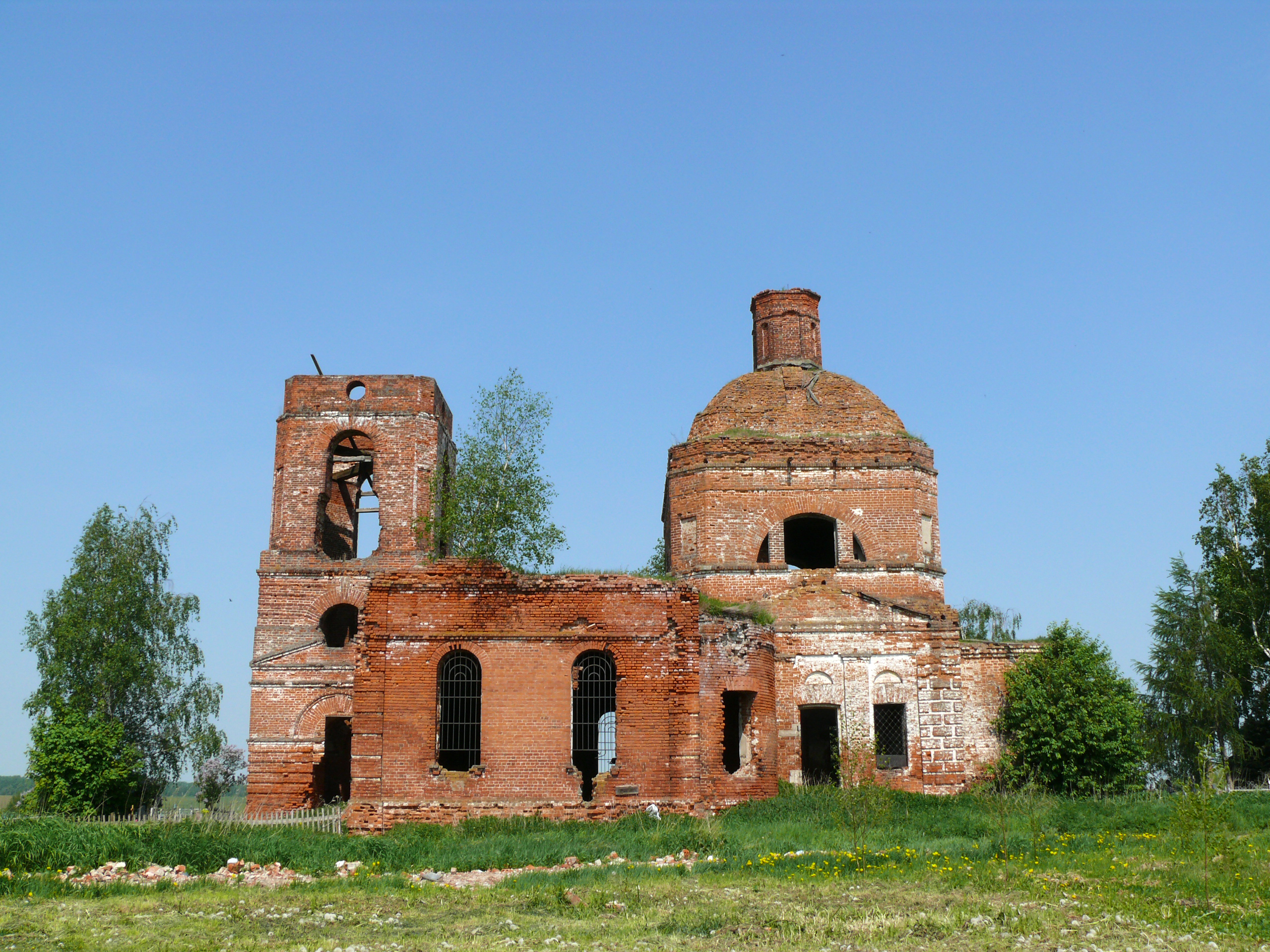 Церковь Вознесения с колокольней: Хотенское, Суздальский район, Владимирская область